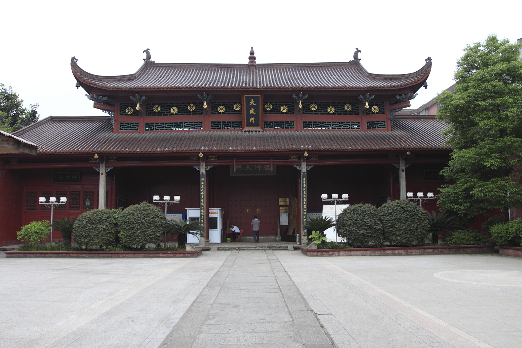 萍乡孔庙，位于江西省萍乡市，是江西省文物保护单位